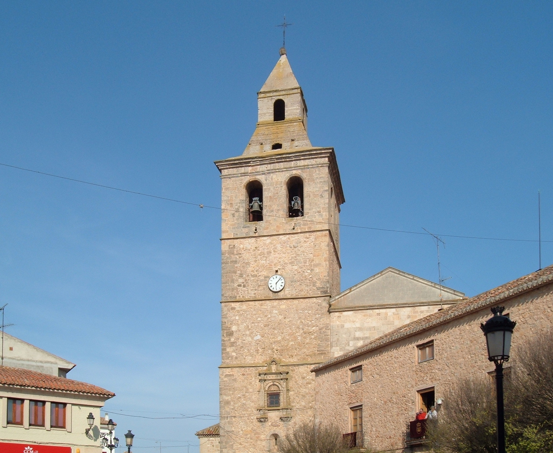 Iglesia de EL Bonillo el día del certamen